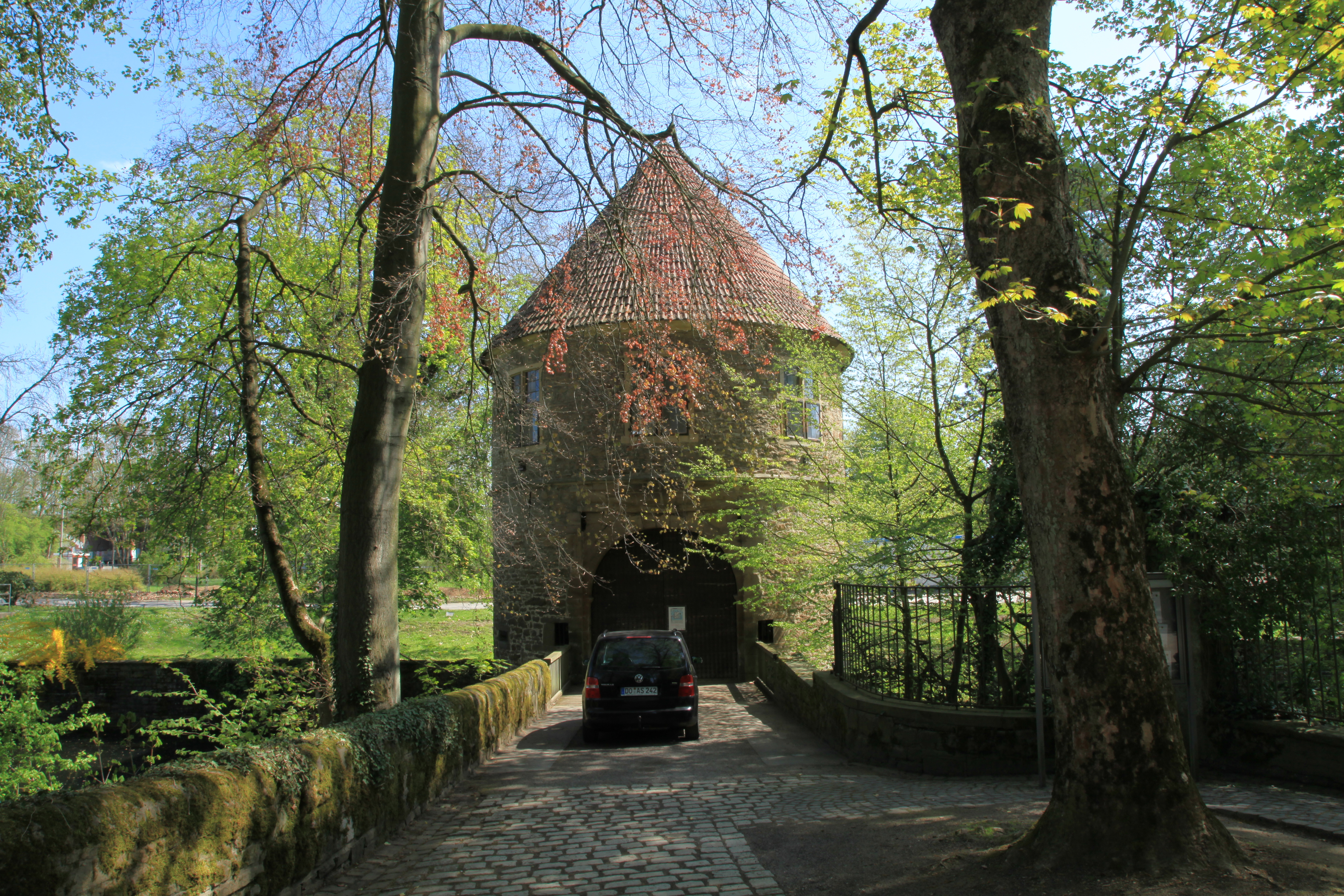 Torhaus Brünninghausen, Am Rombergpark in Dortmund